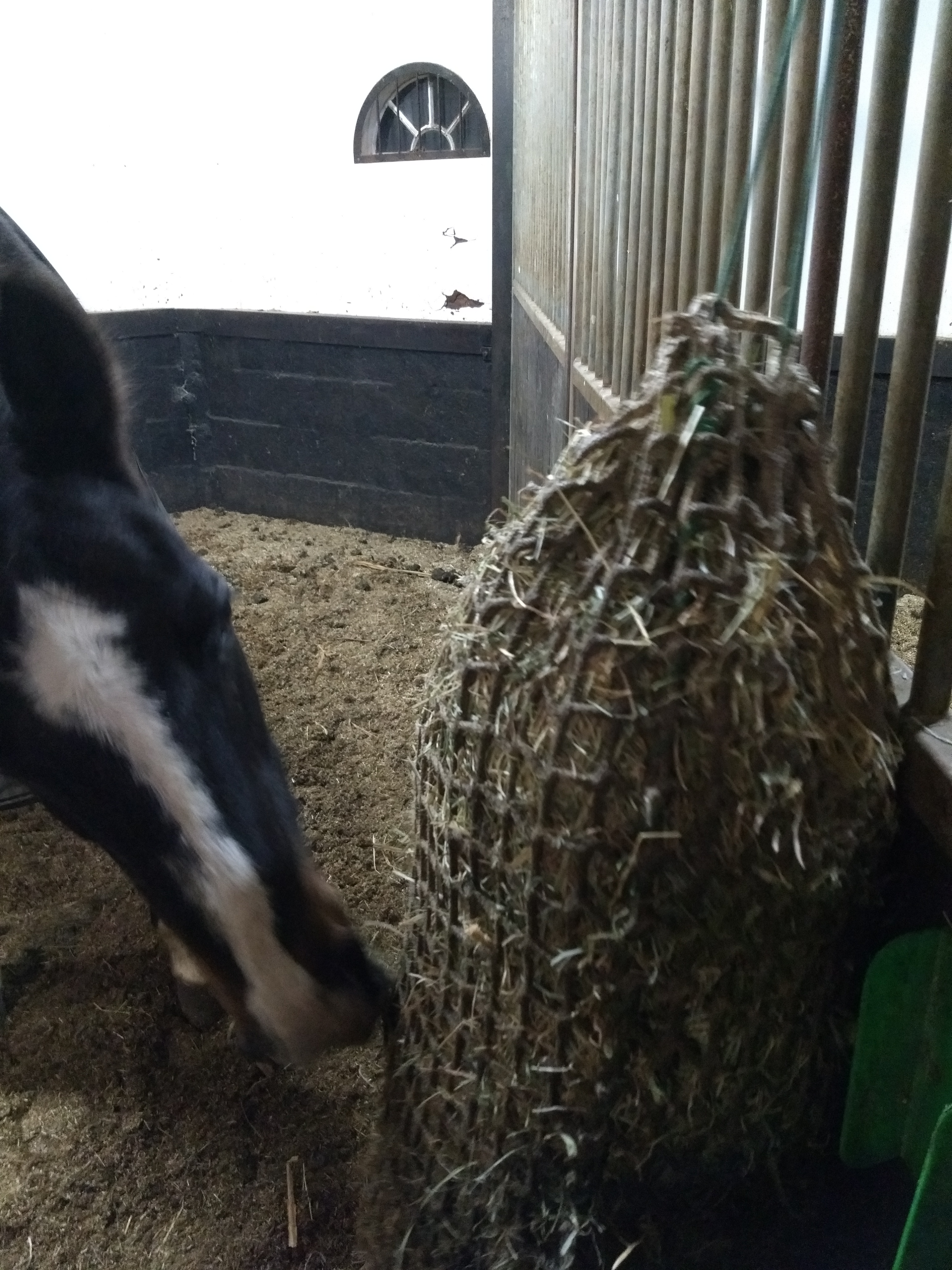 voederzak